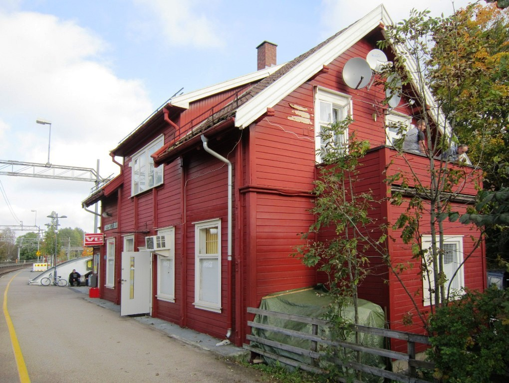 Oppegård stasjon